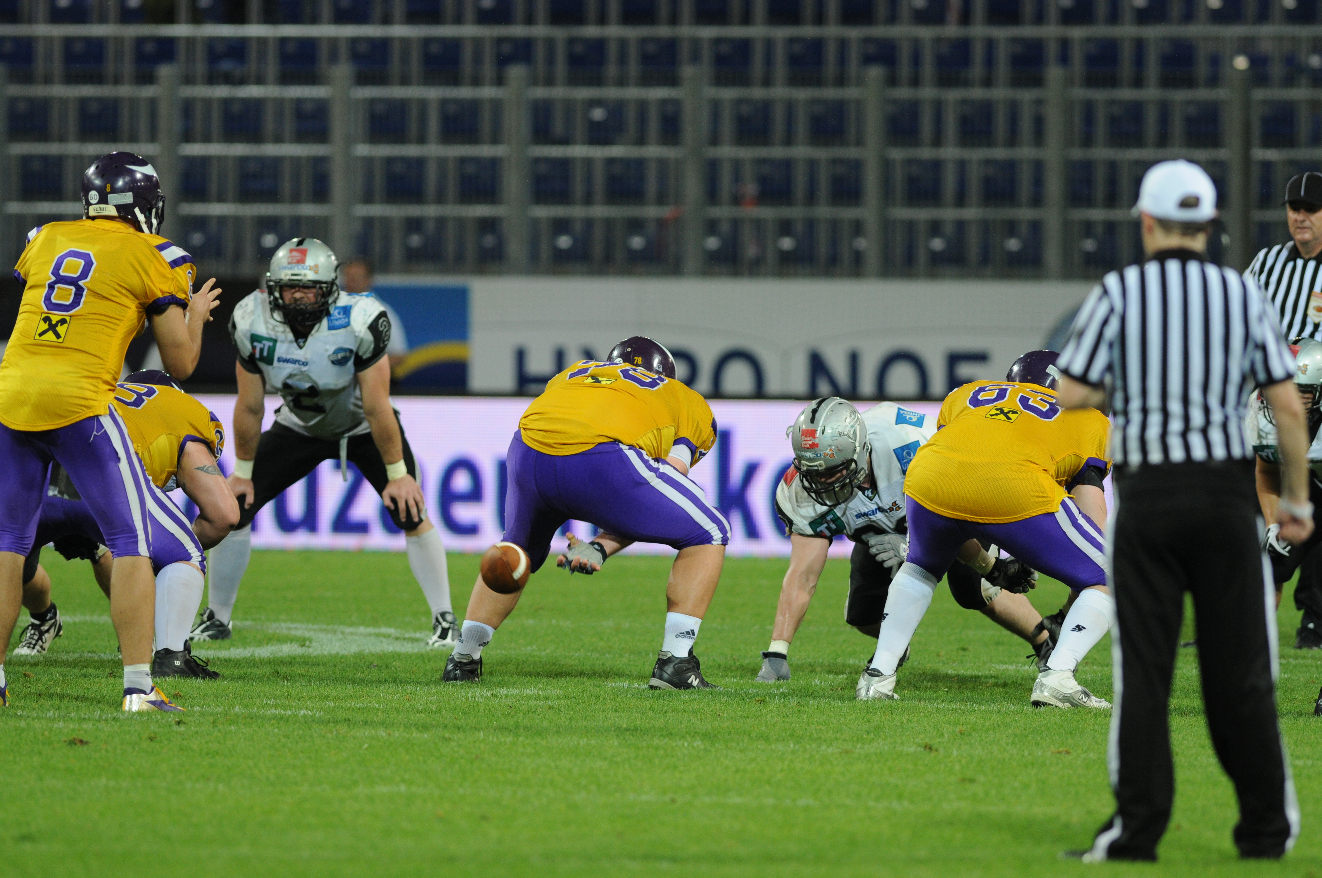 Austrian Bowl XXIX in der NV Arena in St. Pölten